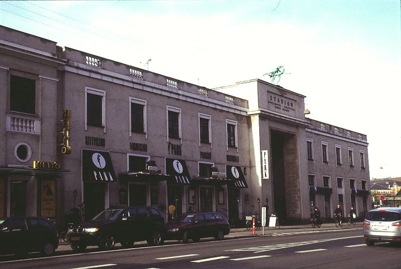 Hans Egedes Kirke i Danmark. Park teatret og indgagnsportal til Idrætsparken